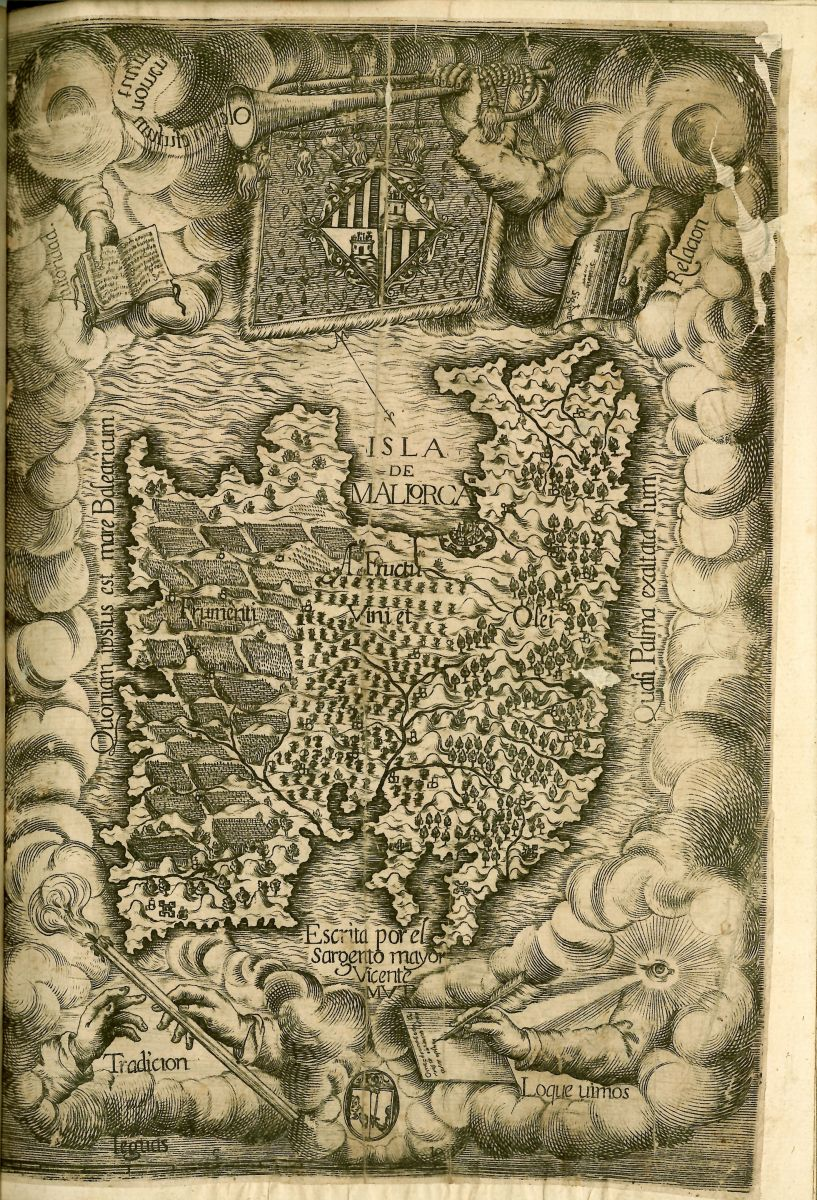 Primer mapa imprés a Mallorca i als Països Catalans